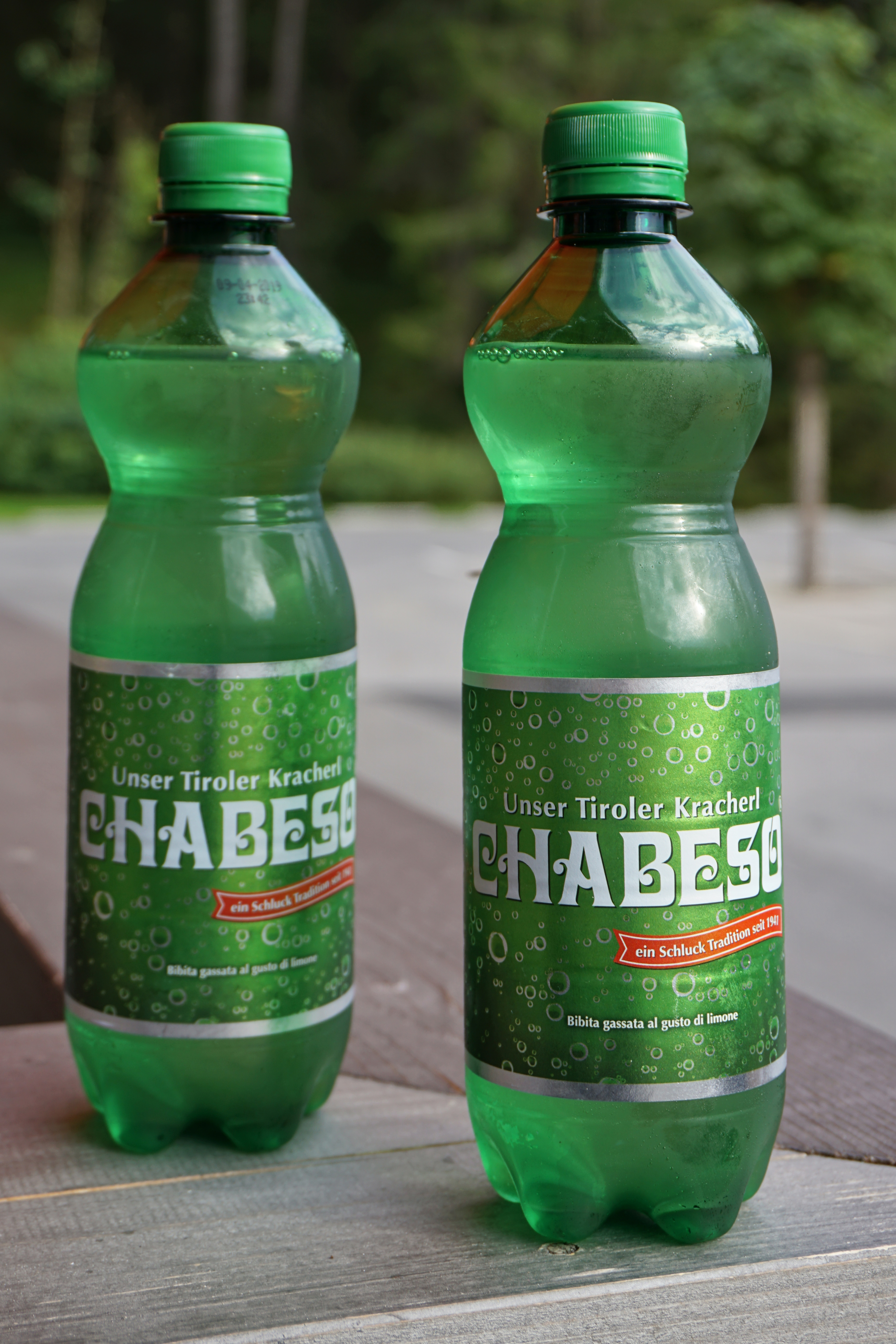 Zwei 0,5-L-PET-Flaschen Chabeso; Zitronen-Limonade aus Wattens, Tirol